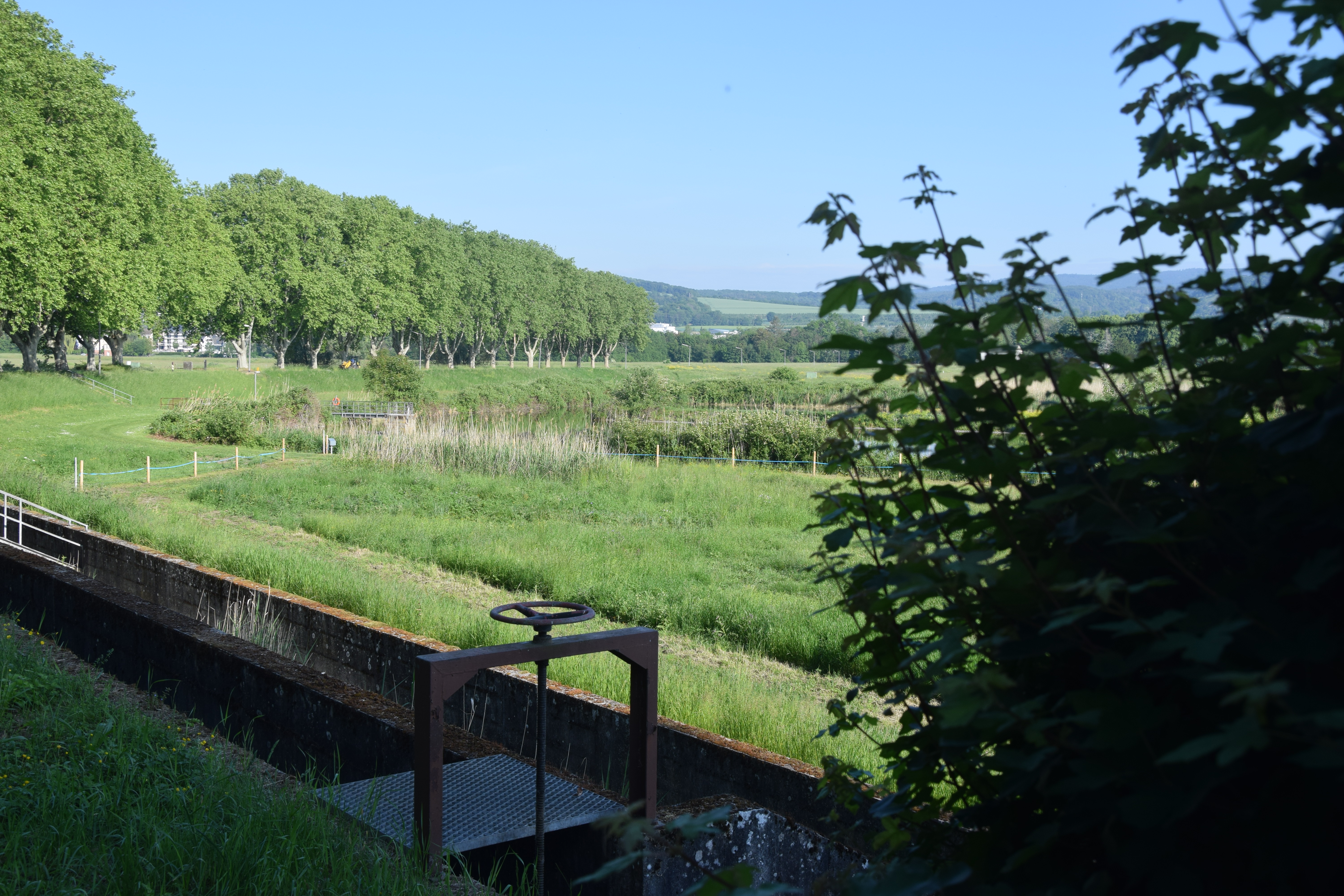 Wasserwerk Schierstein